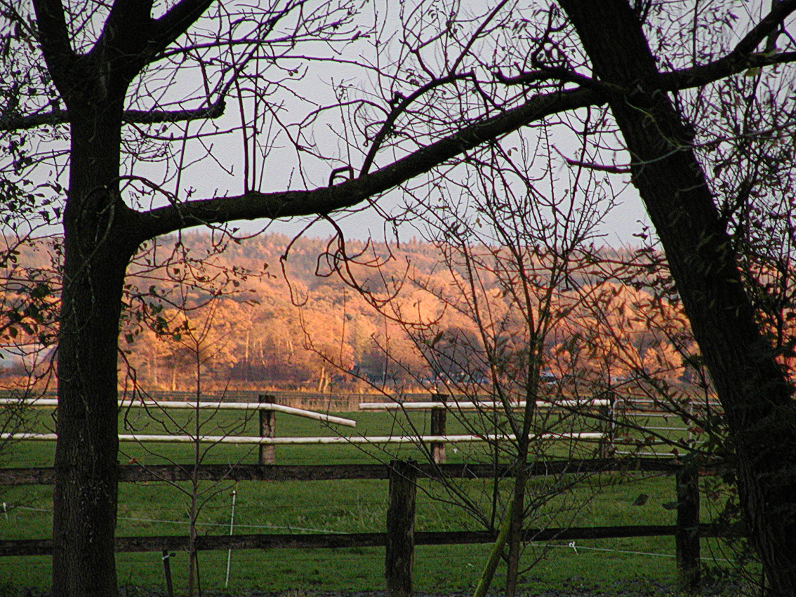 Die Wingst im Abendlicht aus Westen gesehen